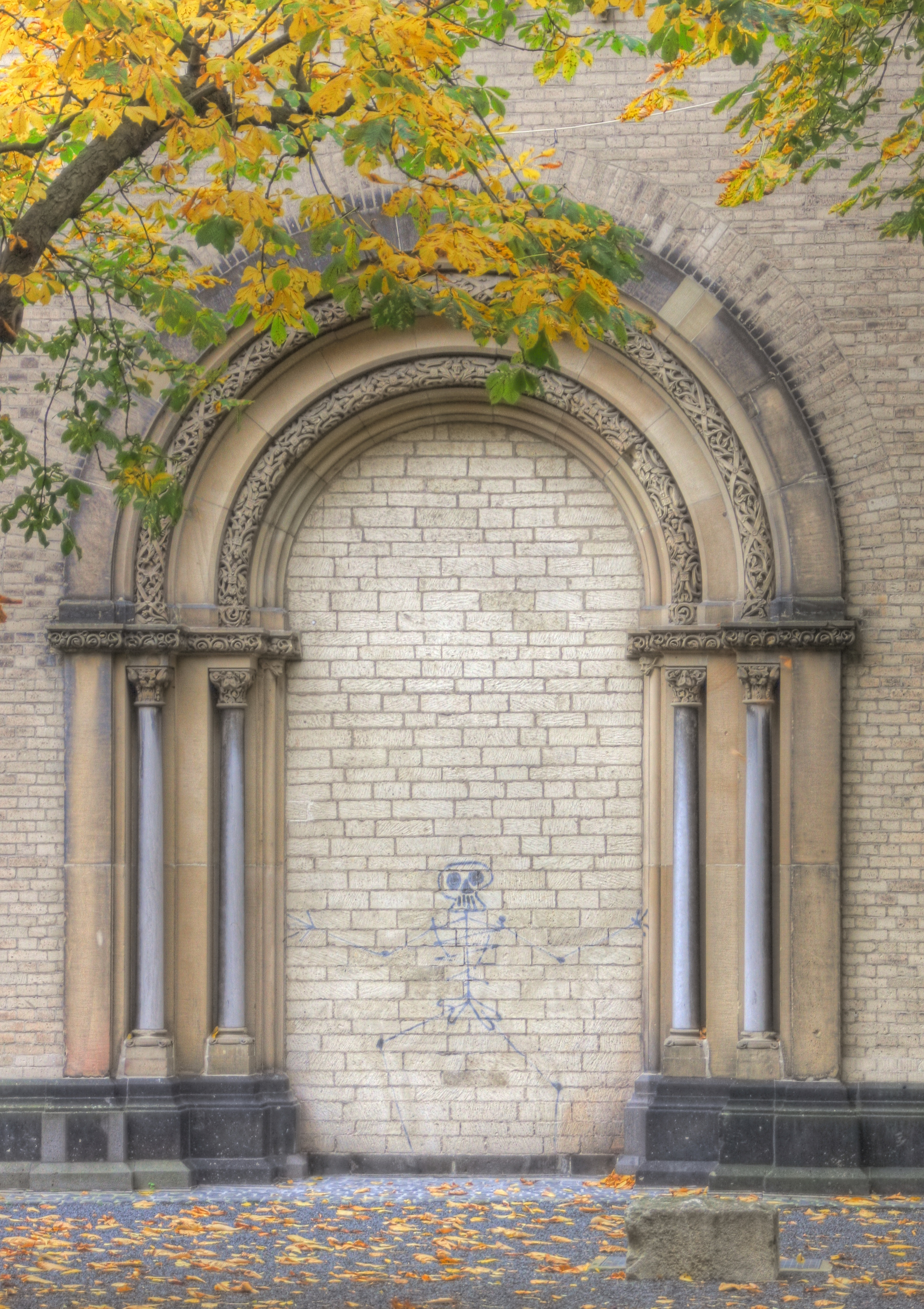 Kölner Totentanz - Memento mori